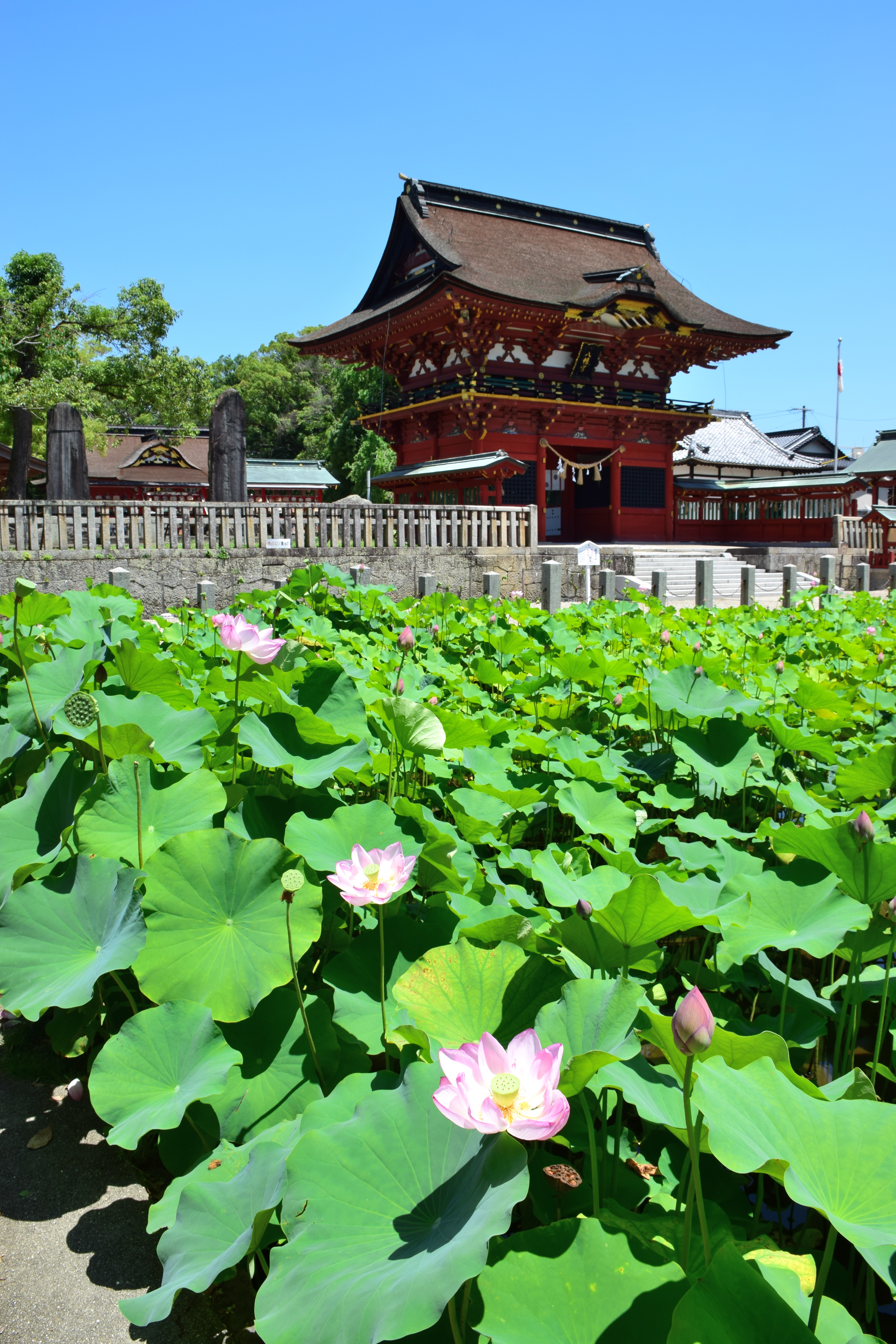 伊賀八幡宮とハス Nikon D5300